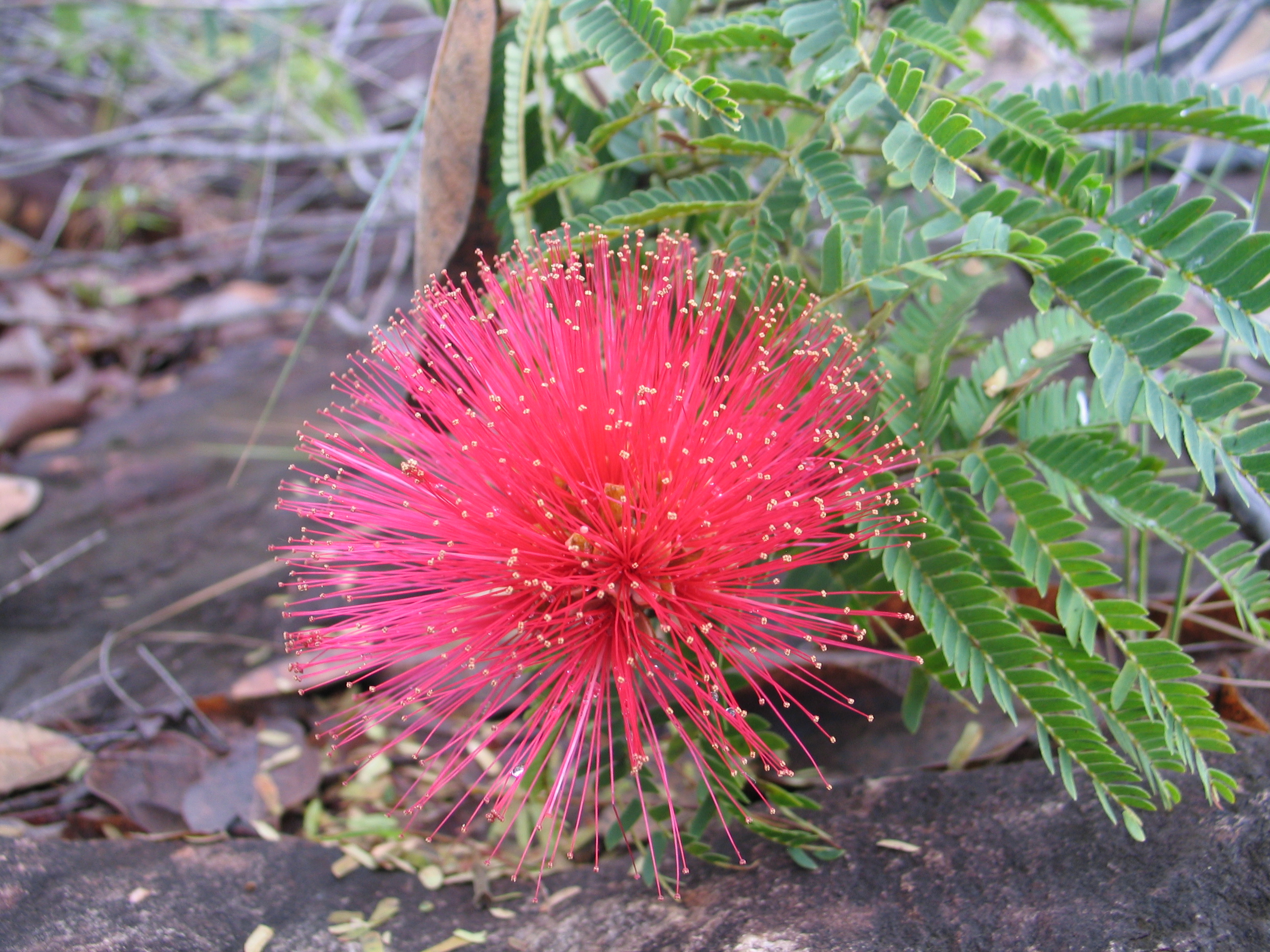 Uma Caliandra (flor) na Serra do Cipó